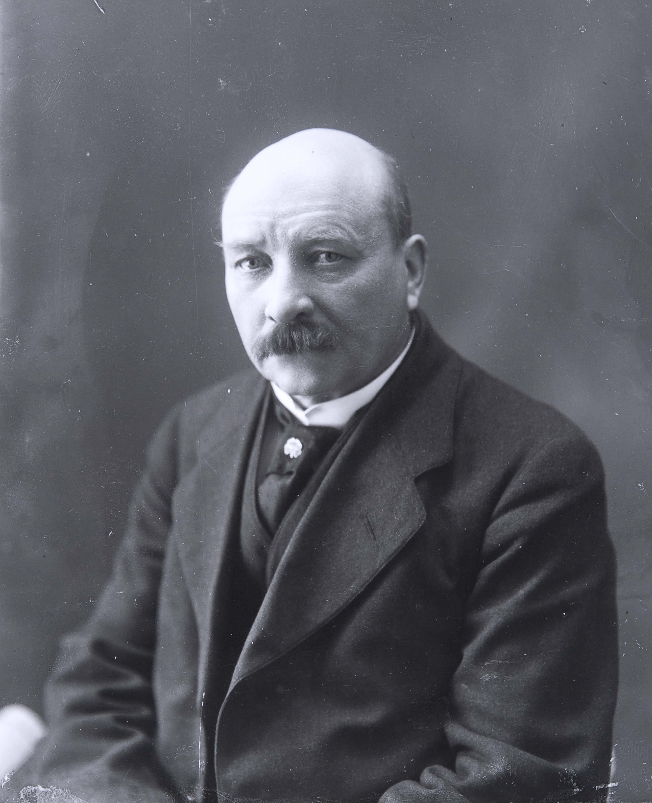 Victor Westerholm